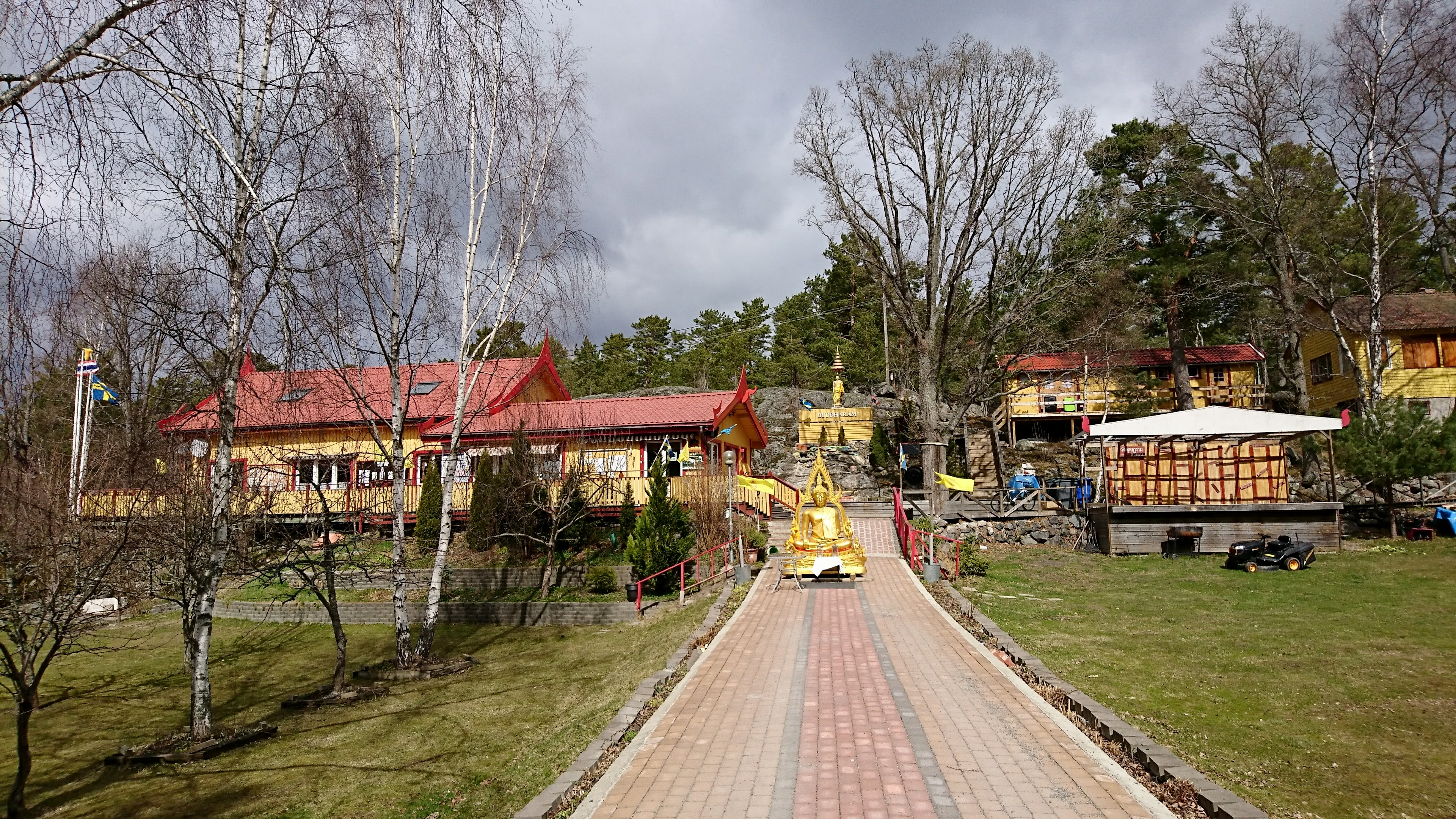 Buddharam Tempel, Buddhistiskt tempel i Torsby, Värmdö kommun.